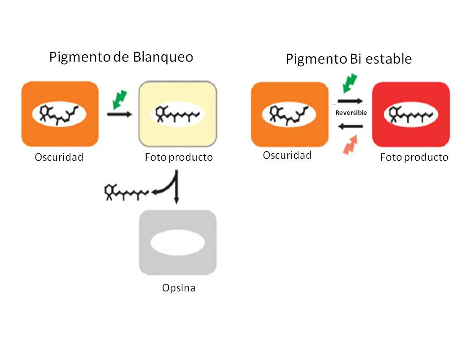 Pigmentos en vertebrados de blanqueo (izquierda) y pigmentos típicos de invertebrados (derecha)